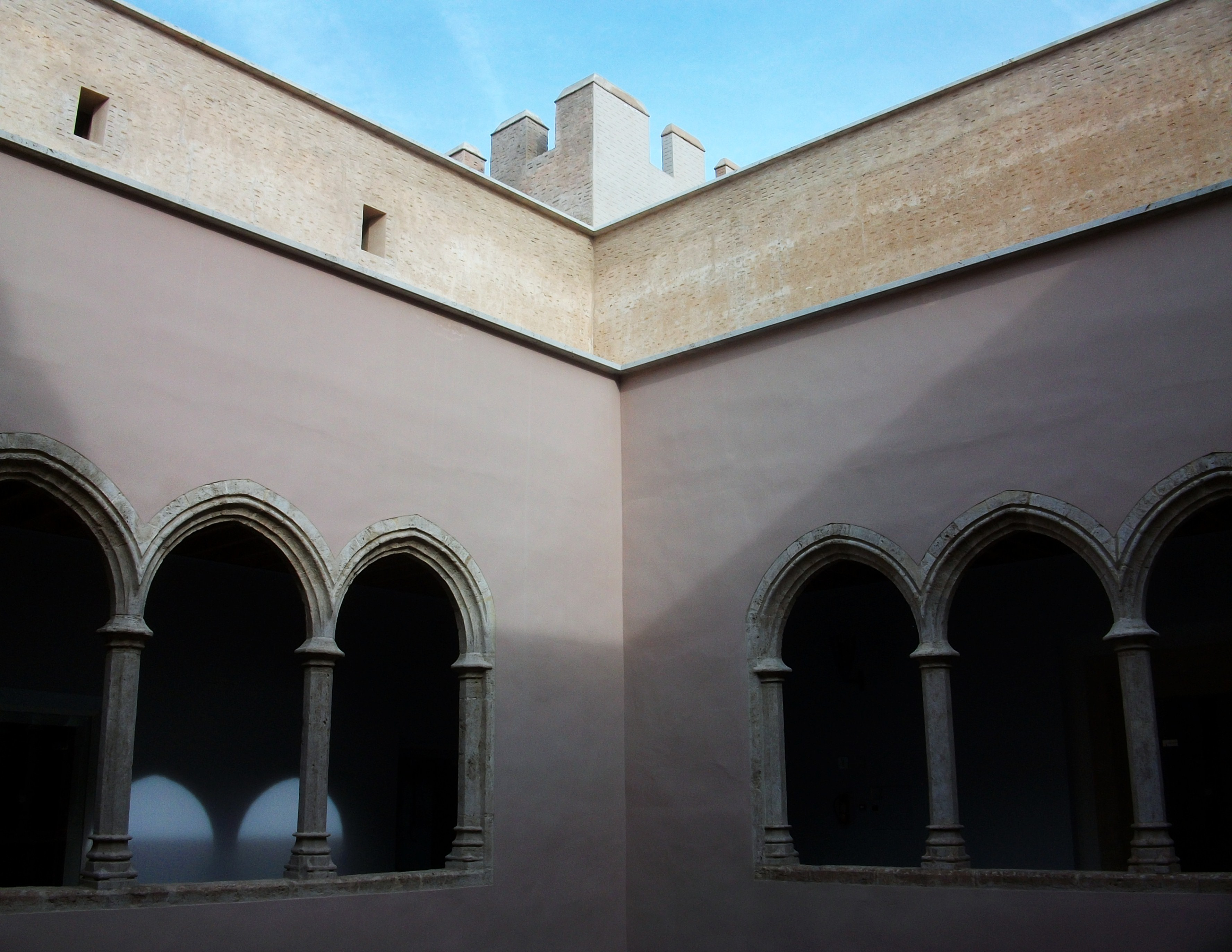 Segon pis del pati del castell d'Alaquàs.